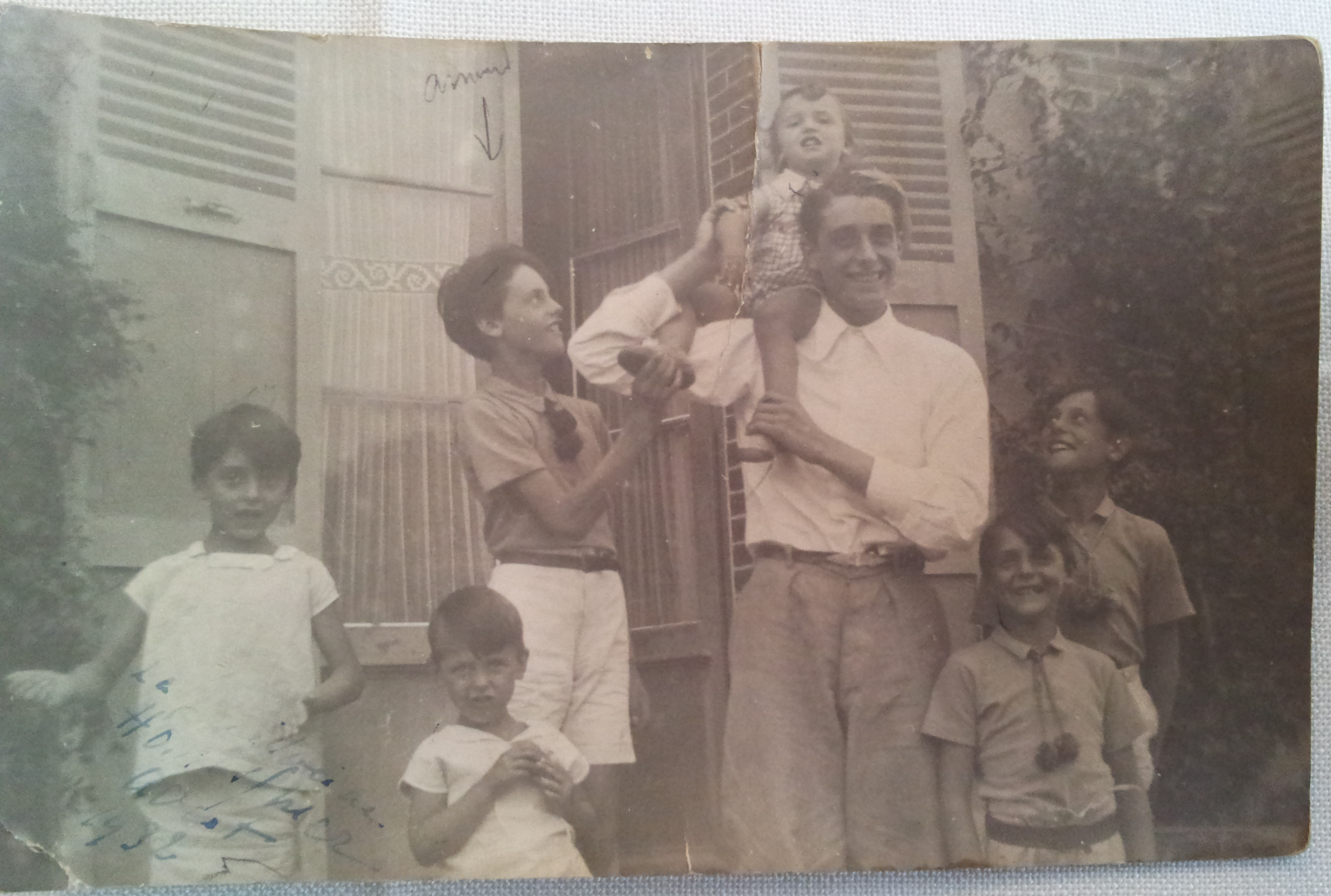 A la Guitoune (Cabourg) en août 1932